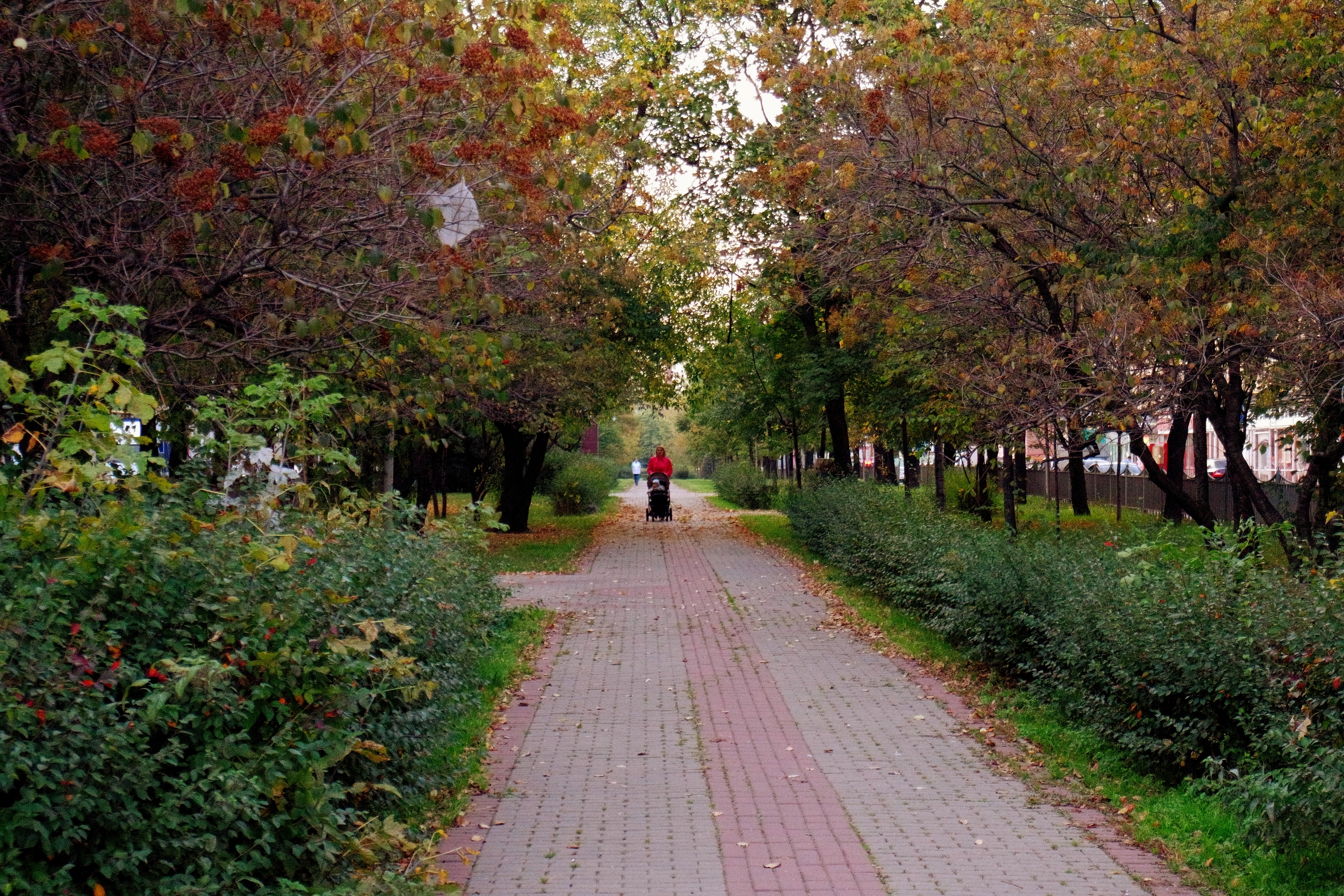 Аллея между полосами улицы Добролюбова